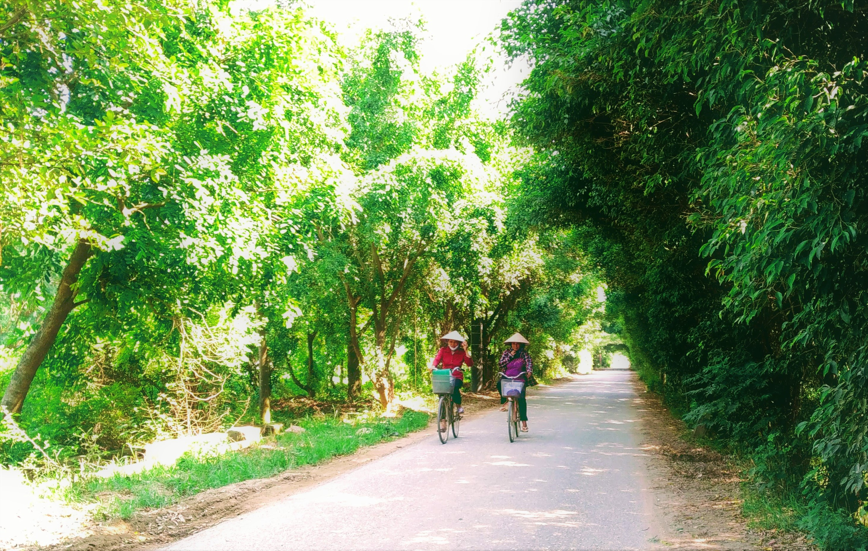 Đường quê thanh bình gợi nhớ đến làng quê Việt Nam xưa.